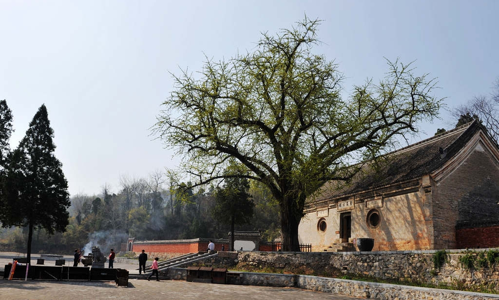 Xichuan